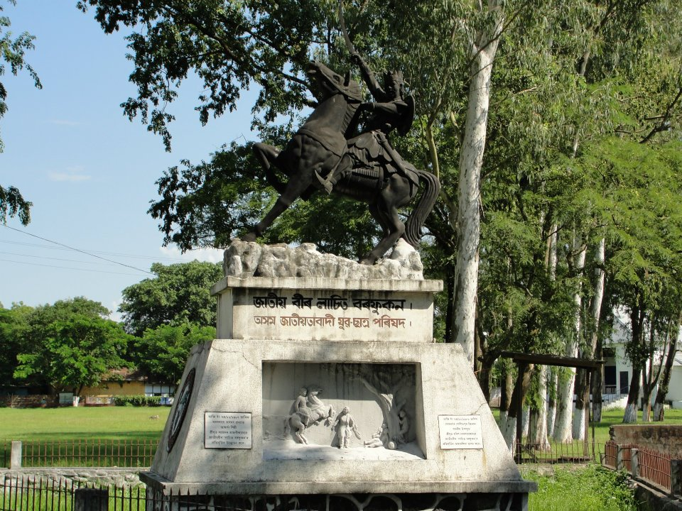 অসমীয়া: তেজপুৰৰ চাৰ্চ ফিল্ডৰ সমীপত প্ৰতিষ্ঠিত বীৰ লাচিতৰ প্ৰতিমূৰ্তি